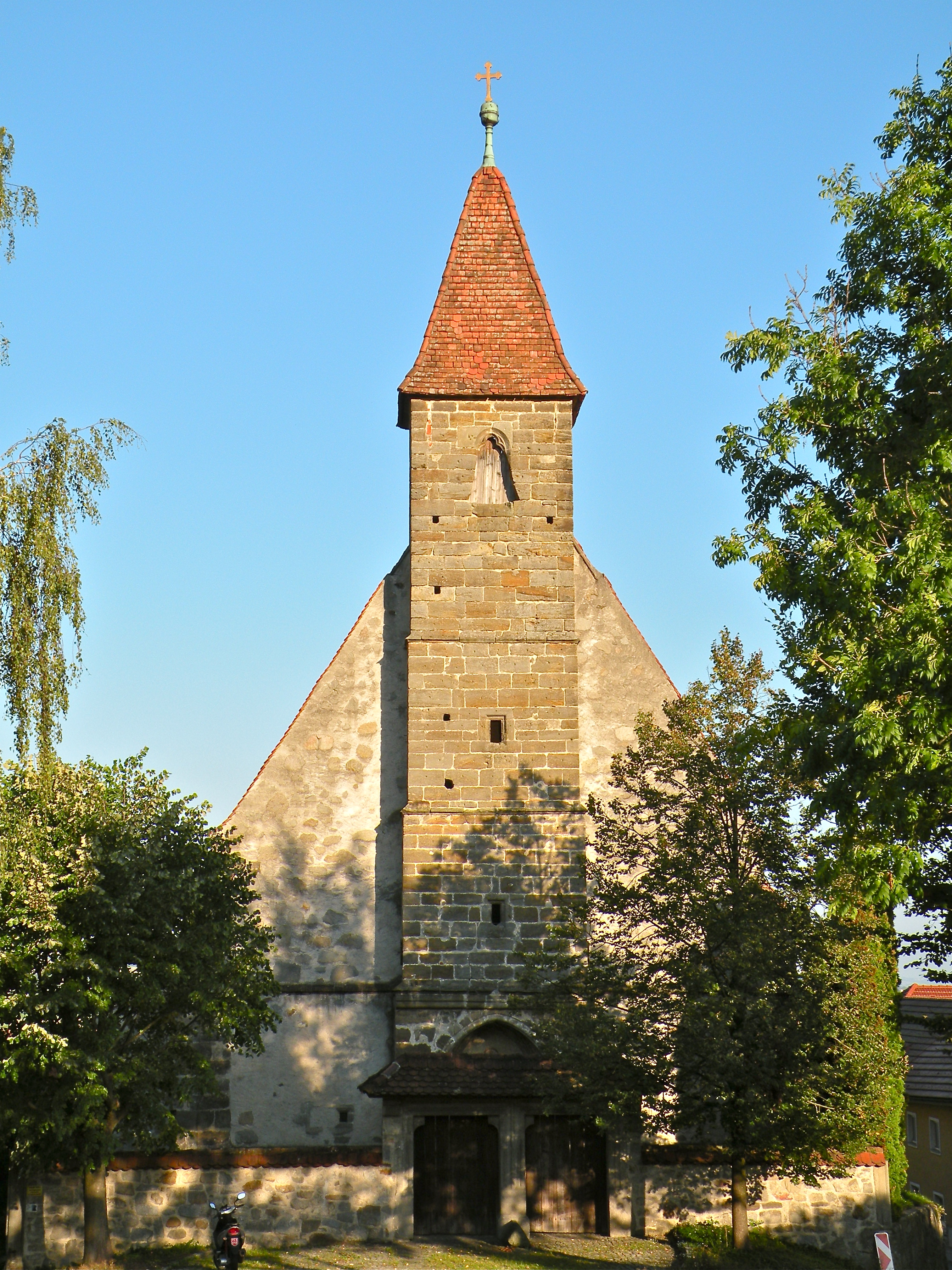 Kath. Filialkirche Mariä Himmelfahrt in Niederzirking in Ried in der Riedmark im Bezirk Perg in Oberösterreich